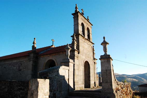 Igreja de Meijinhos